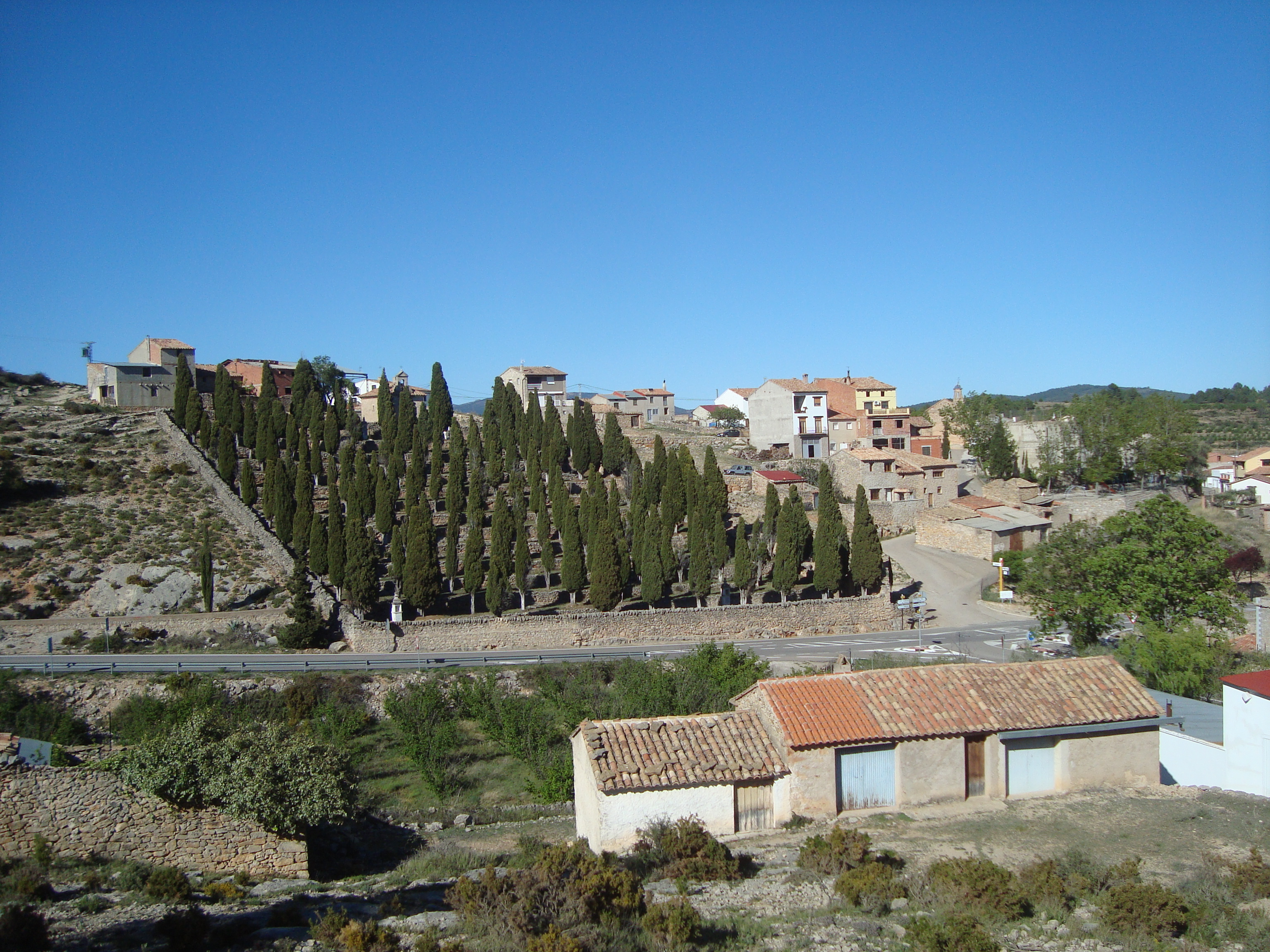 Calvari (Sucaina) 08.142-004.